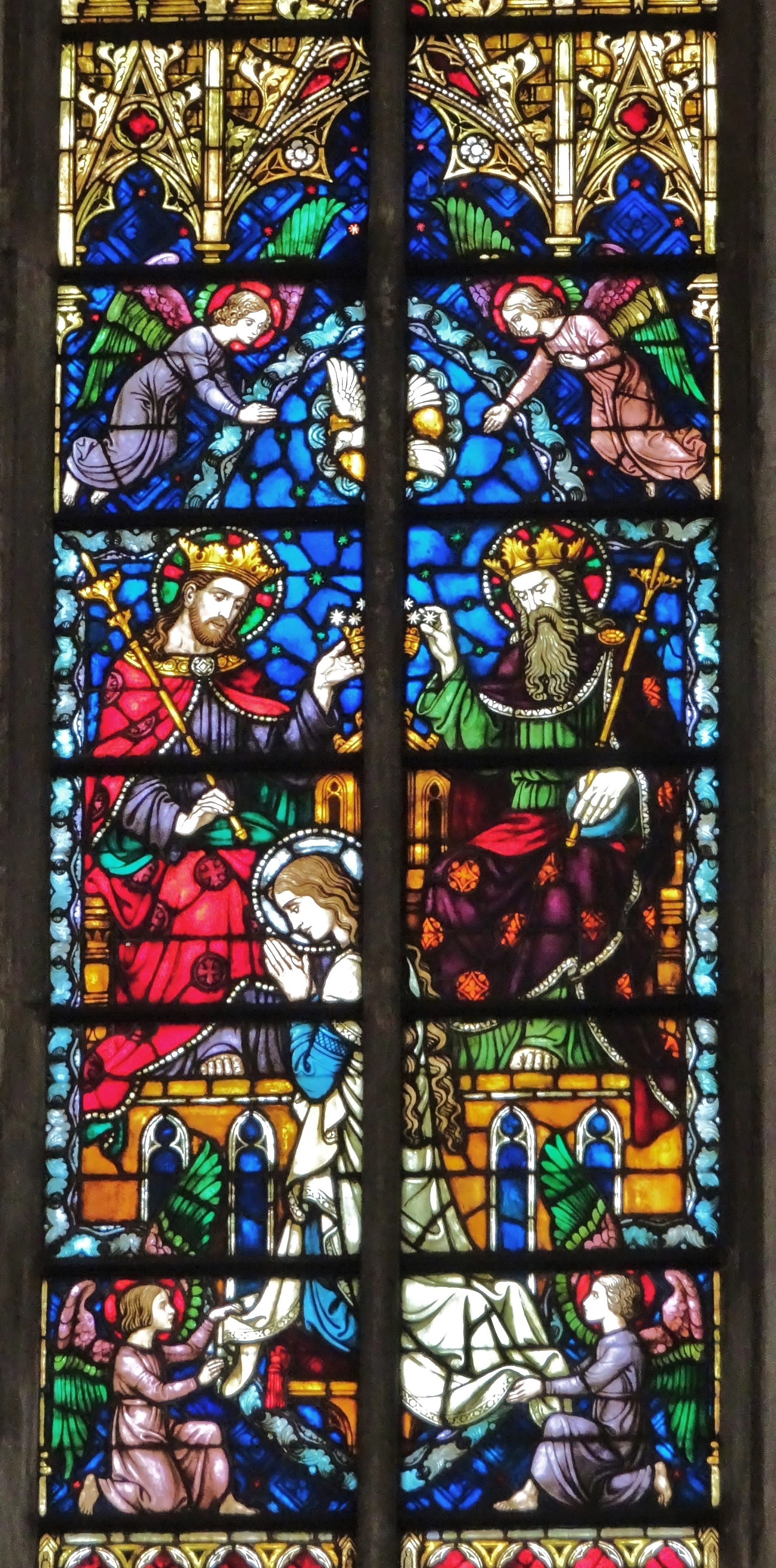 Stiftkirche Admont, Teilansicht eines Glasfensters der Apsis mit Darstellung der Marienkrönung